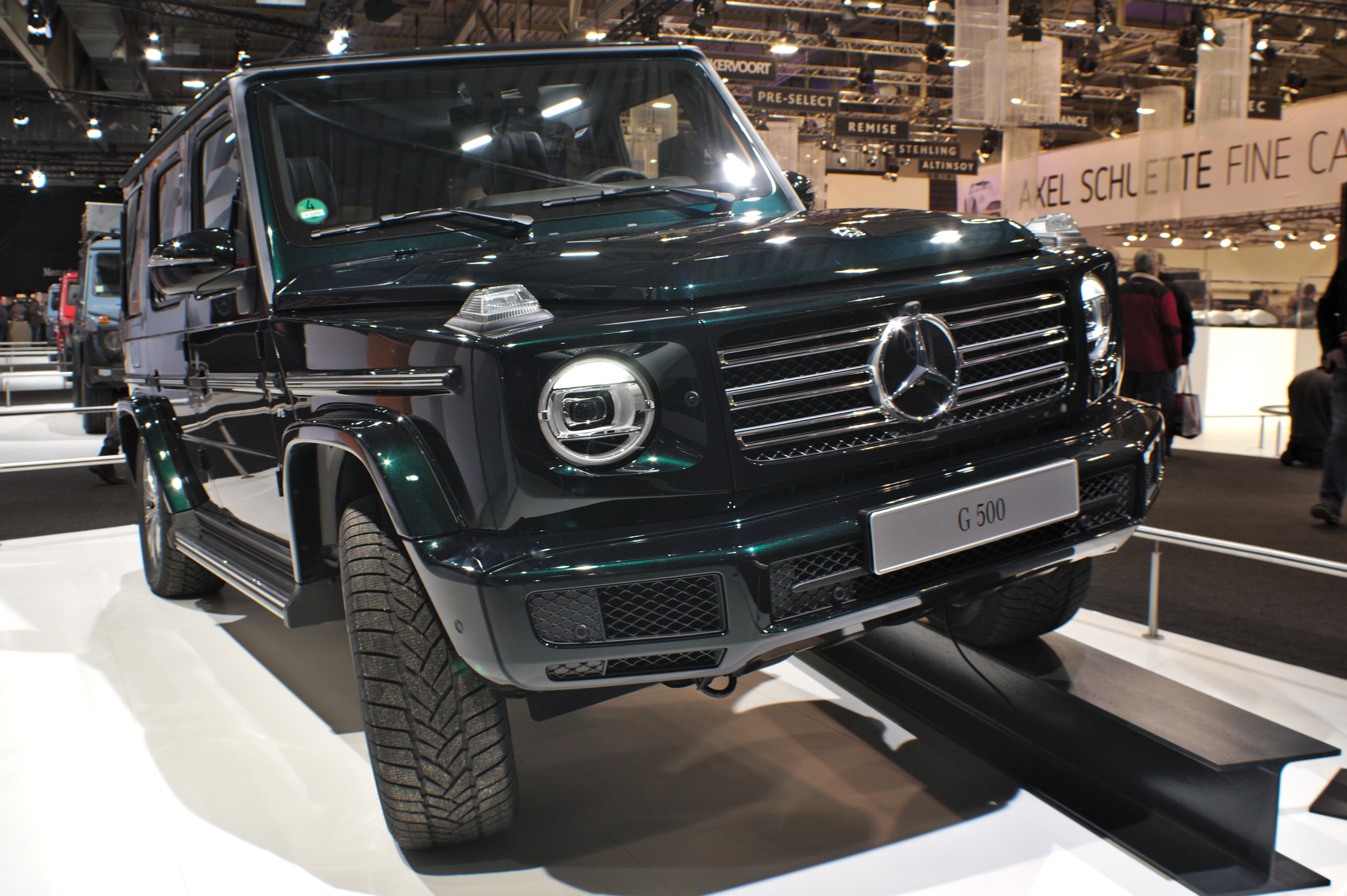 Techno Classica 2018